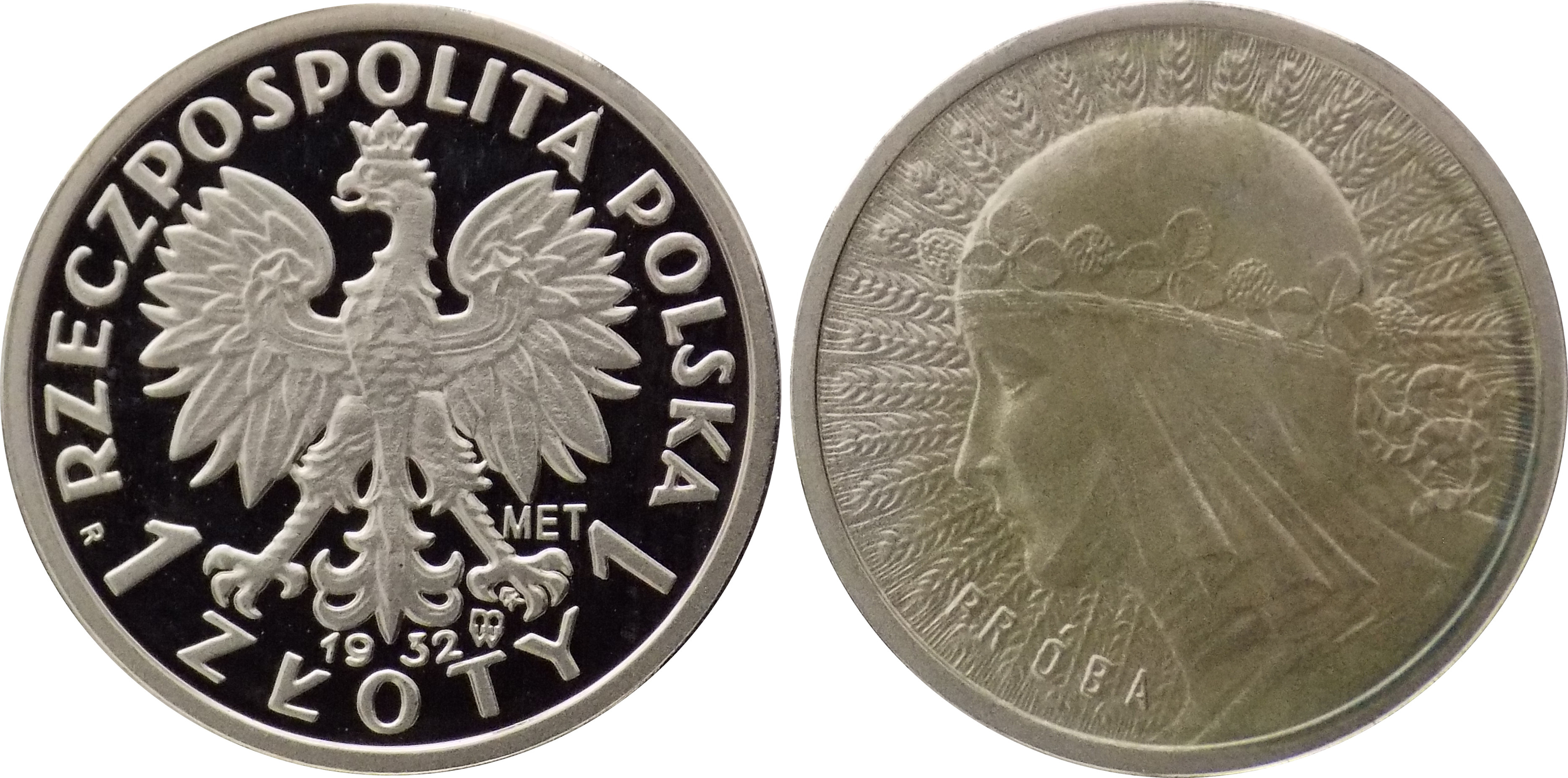 Replika 1 złoty 1932 Polonia